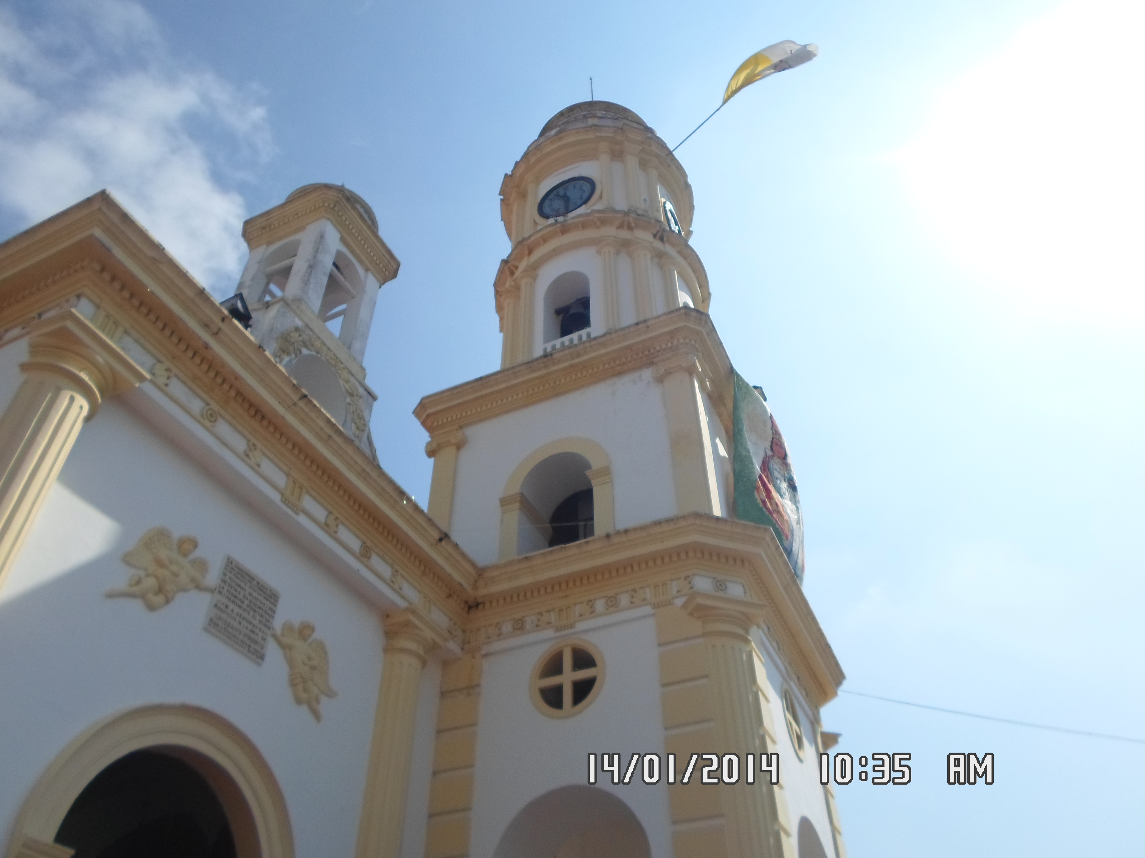 Frontis del Santuario